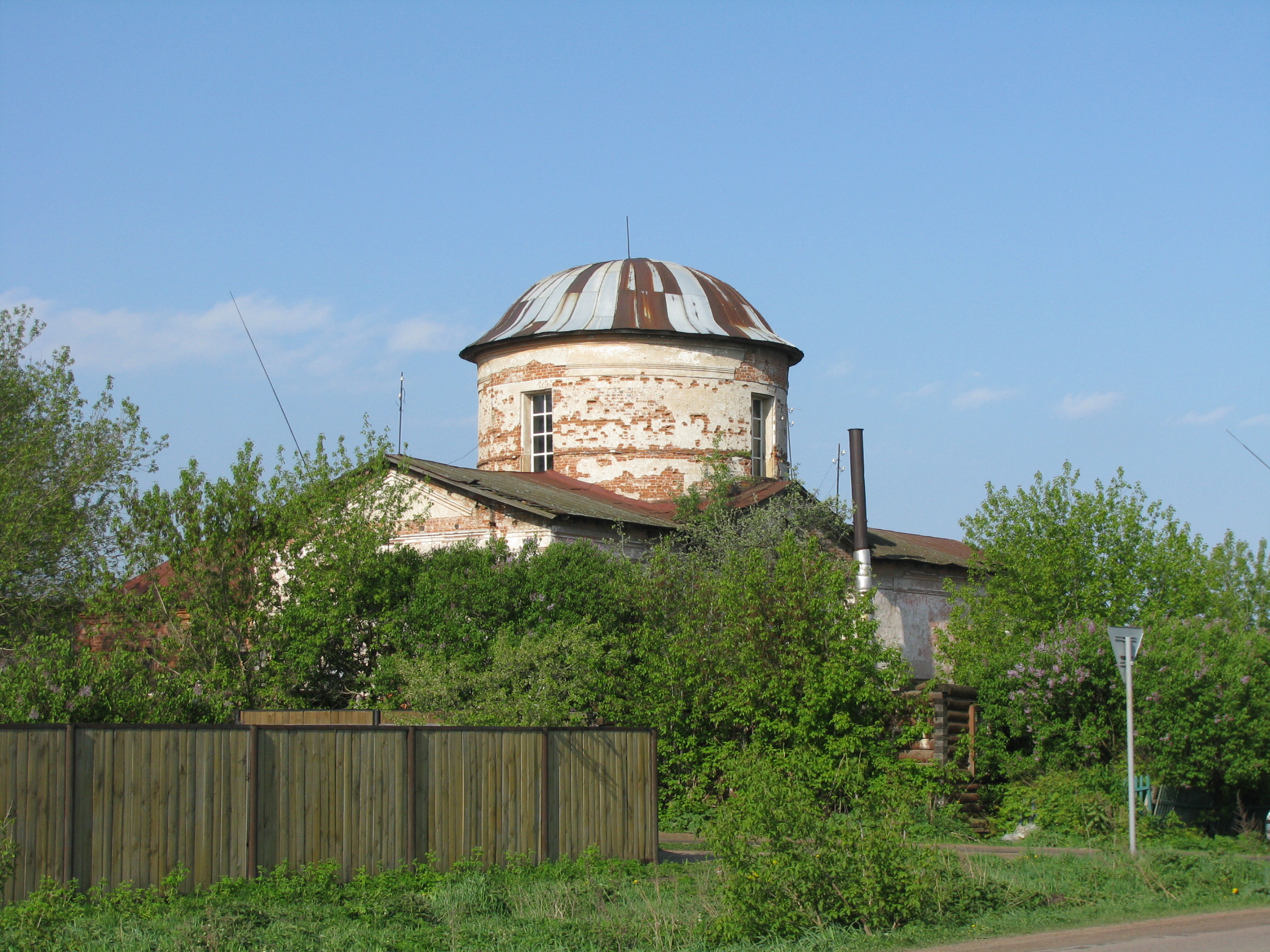 St.Nicolas Church in Lukyanovo village (Serpukhov District, Moscow Region), 1835/Церковь святителя Николая (1835 г.) в деревне Лукьяново Серпуховского района Московской области